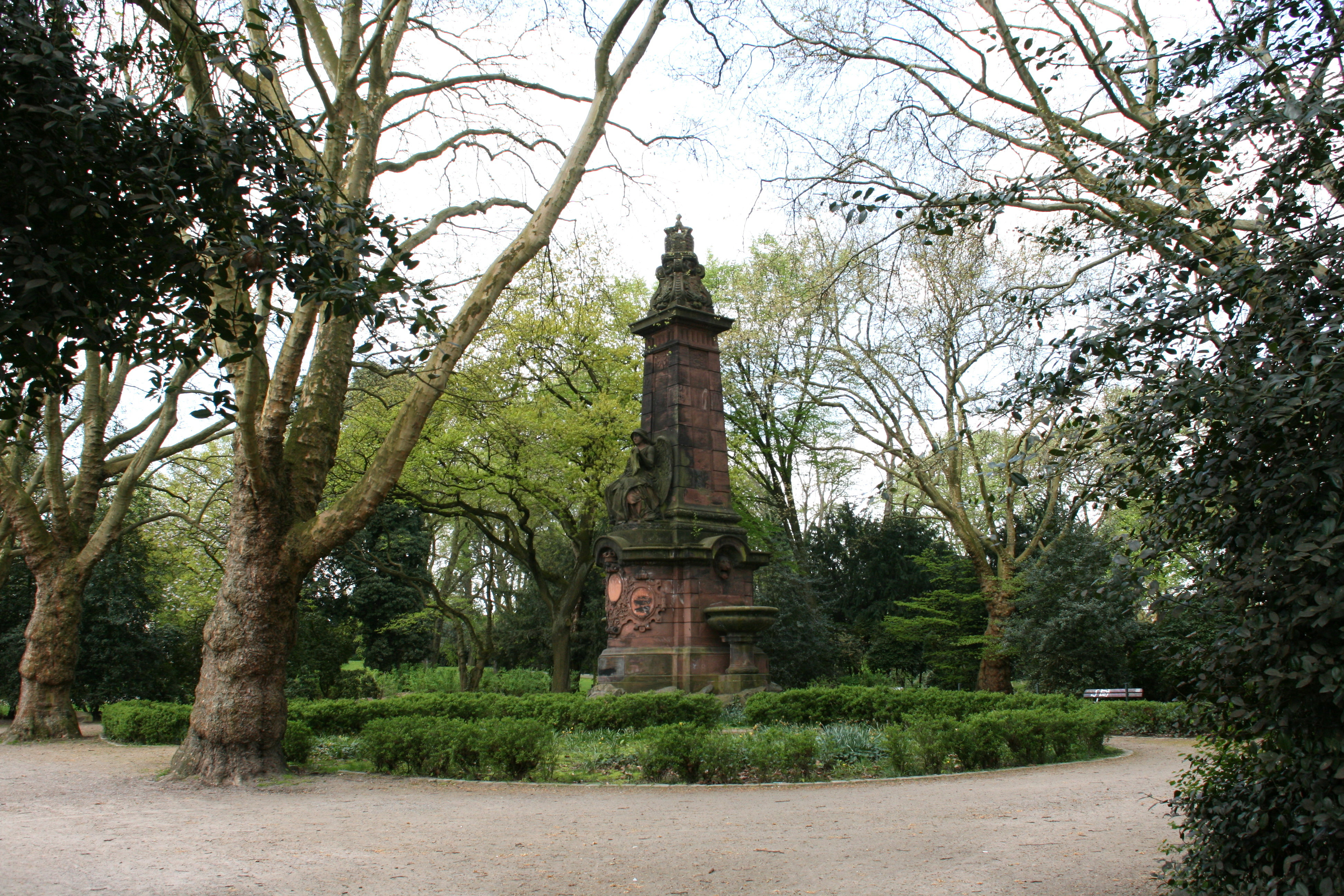 Kaiserbrunnen im Stadtgarten Wanne-Eickel, Am Böckenbusch in Herne